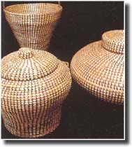 eigenes Archiv(Alte Technik)